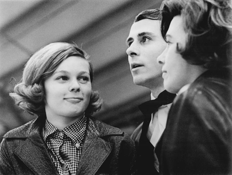 Gabriele Seyfert, Jutta Müller, Emmerich Danzer Zentralbild Gahlbeck 24.3.1966 Karl-Marx-Stadt: Eiskunstlaufen - Internationales Schaulaufen Nach ihren großartigen Erfolgen bei den Welt- und Europameisterschaften (Silbermedaillen) hat das Eissportpublikum der DDR erstmals wieder Gelegenheit, das Können von Gabriele Seyfert (SC Karl-Marx-Stadt) -links- zu bewundern. Hier zusammen mit Trainer-Mutti Jutta Müller (rechts) und Weltmeister Emmerich Danzer (Österreich, Mitte) beim Schaulaufen am 23.2.1966 in Karl-Marx-Stadt. Das traditionelle Frühjahrsschaulaufen des DELV wird in Berlin am 26. und 27.3.1966 beendet. Abgebildete Personen: Seyfert, Gabriele: Eiskunstläuferin, Olympiade 1964 und 1968, DDR Müller, Jutta: Eiskunstlauftrainerin, DDR Danzer, Emmerich: Eiskunstläufer, Österreich (GND 118678825)